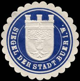 Sealing stamp Title: Siegel der Stadt Buer in Westfalen Description: blau, weiß, geprägt Place: Buer size: 4 cm